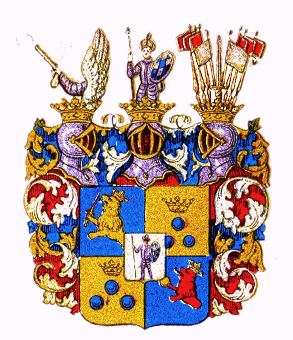 Wappen des Grafen Gustaf Carlsson († 1708), seit 1674 Graf von Börring-Lindholm